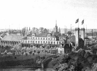 Berliner Bahnhof in Hamburg